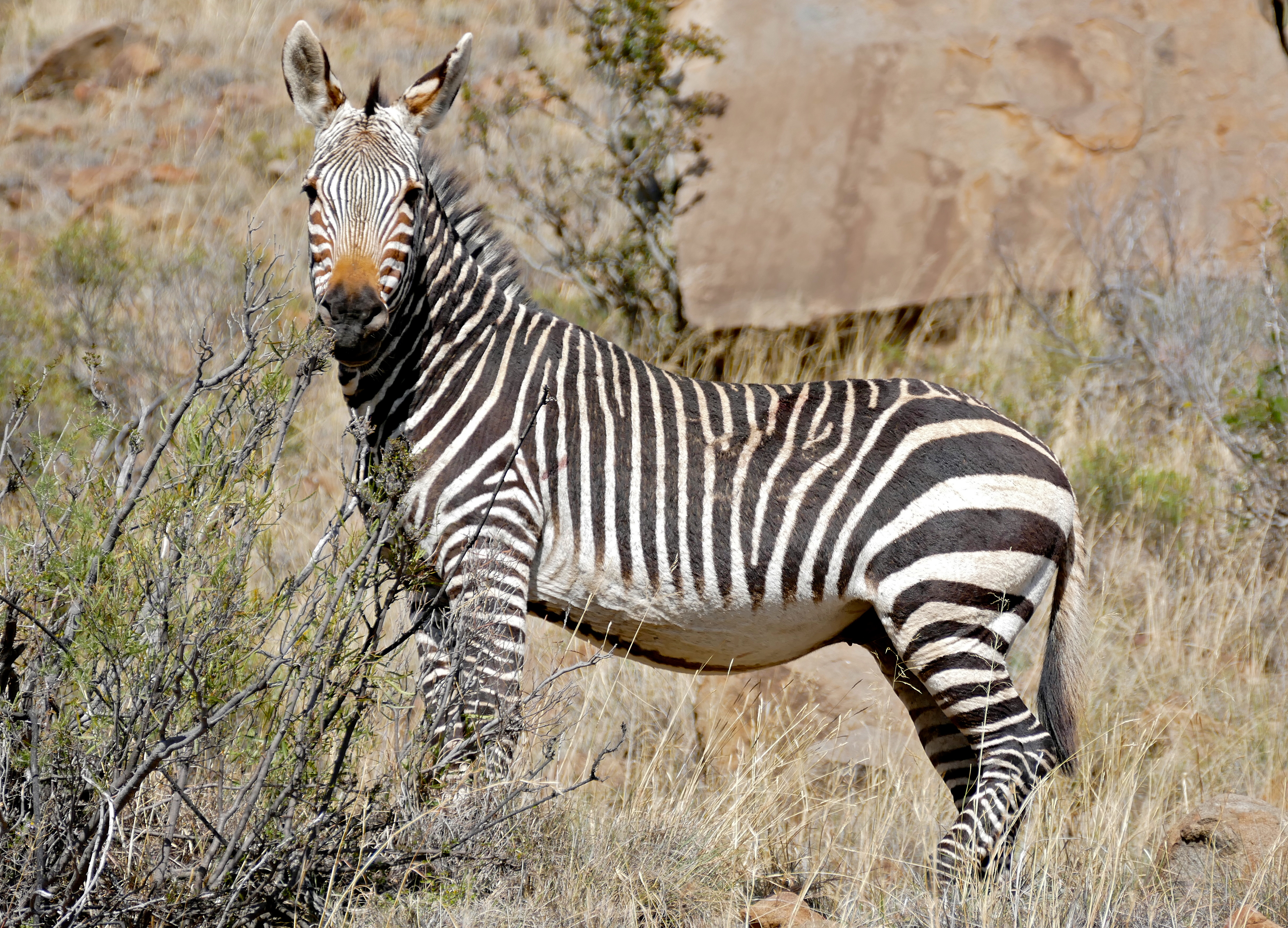 Kranskop Loop, Mountain Zebra NP, Eastern Cape, SOUTH AFRICA